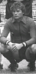 Title: Mannschaftsfoto SG Dynamo Dresden Factual corrections and alternative descriptions are encouraged separately from the original description. Additionally errors can be reported at this page to inform the Bundesarchiv. Original historic description: ADN-ZB-Häßler-16.9.80-Dresden: Fußball-Oberliga. Die Mannschaft der SG Dynamo Dresden für die Spielserie 1980-81. Stehend v.l.n.r.: Mannschaftskapitän Hans-Jürgen Dörner, Andreas Schmidt, Gerd Weber, Andreas Trautmann, Karsten Petersohn, Udo Schmuck, Christian Helm und Reinhard Häfner. Vorn v.l.n.r.: Gerd Heidler, Peter Kotte, Torhüter Jörg Klimpel, Torhüter Claus Boden, Torhüter Bernd Jakubowski, Frank Richter und Matthias Müller.